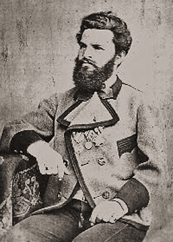 Friedrich Meinel (??-1911), Spielzeugproduzent und -händler in Bad Kissingen